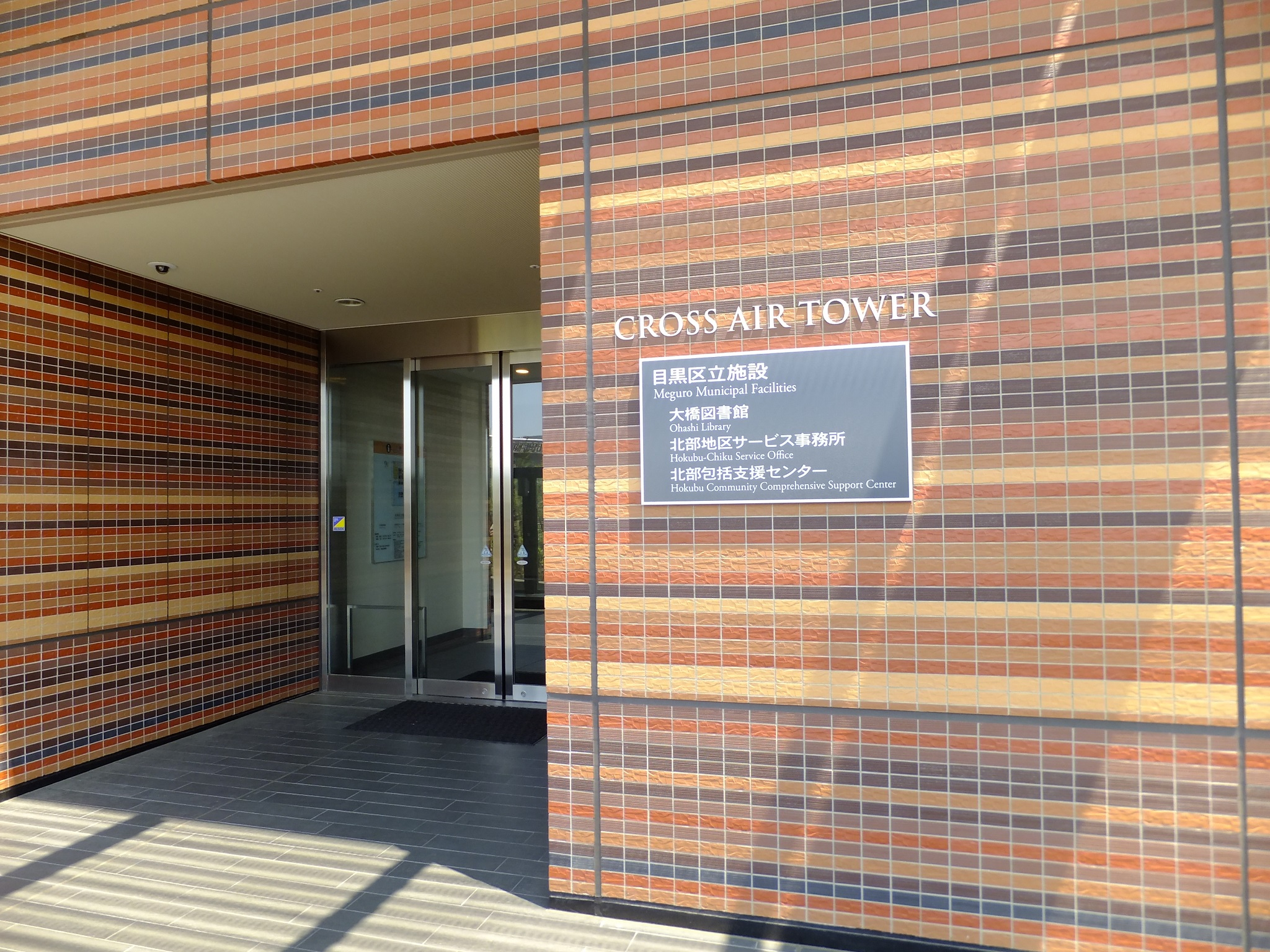 目黒区立大橋図書館。クロスエアタワー9階に他の目黒区立施設とともに設置されており、目黒天空庭園と連絡通路で接続している。